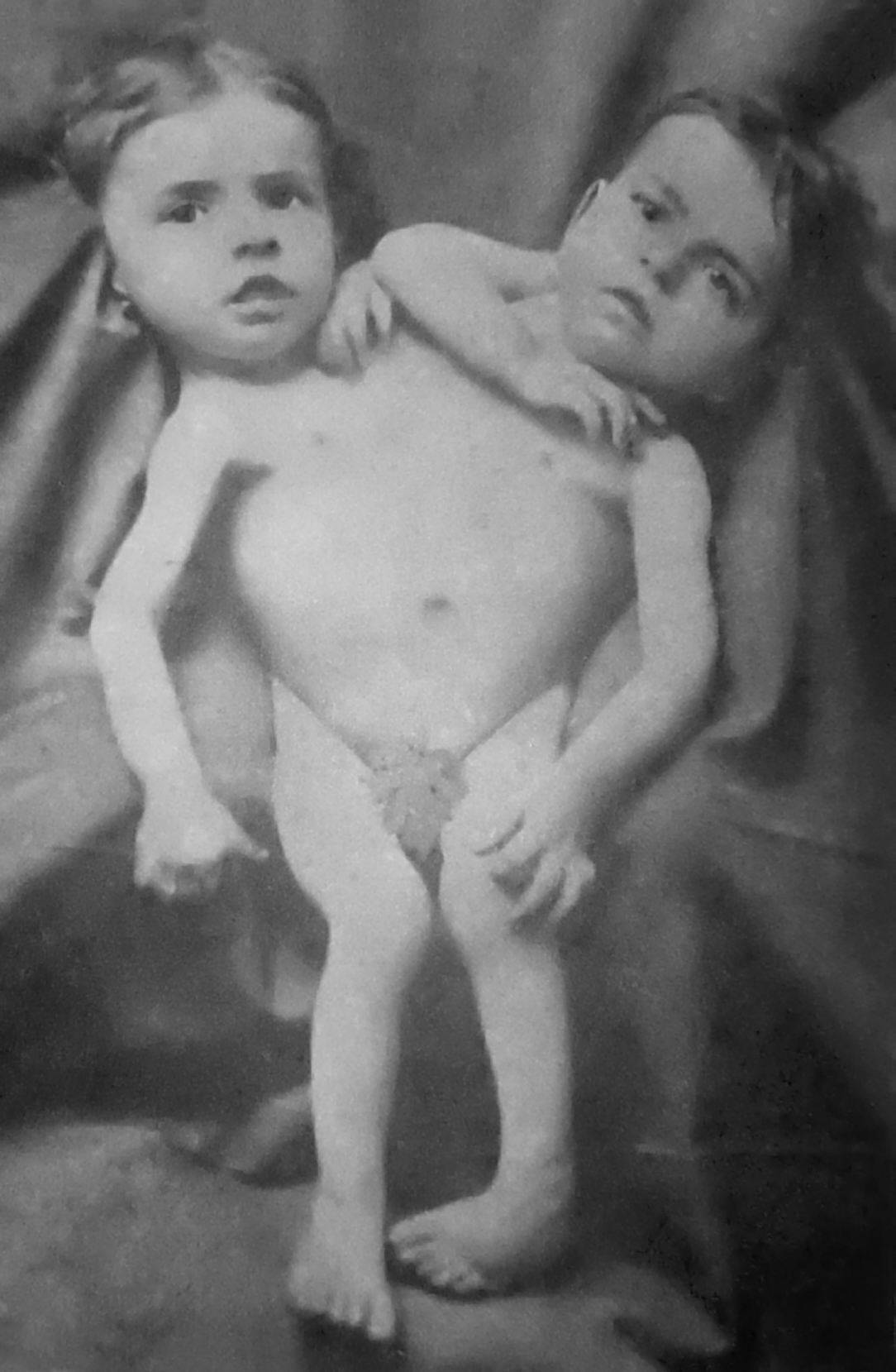 die Tocci-Zwillinge 1881